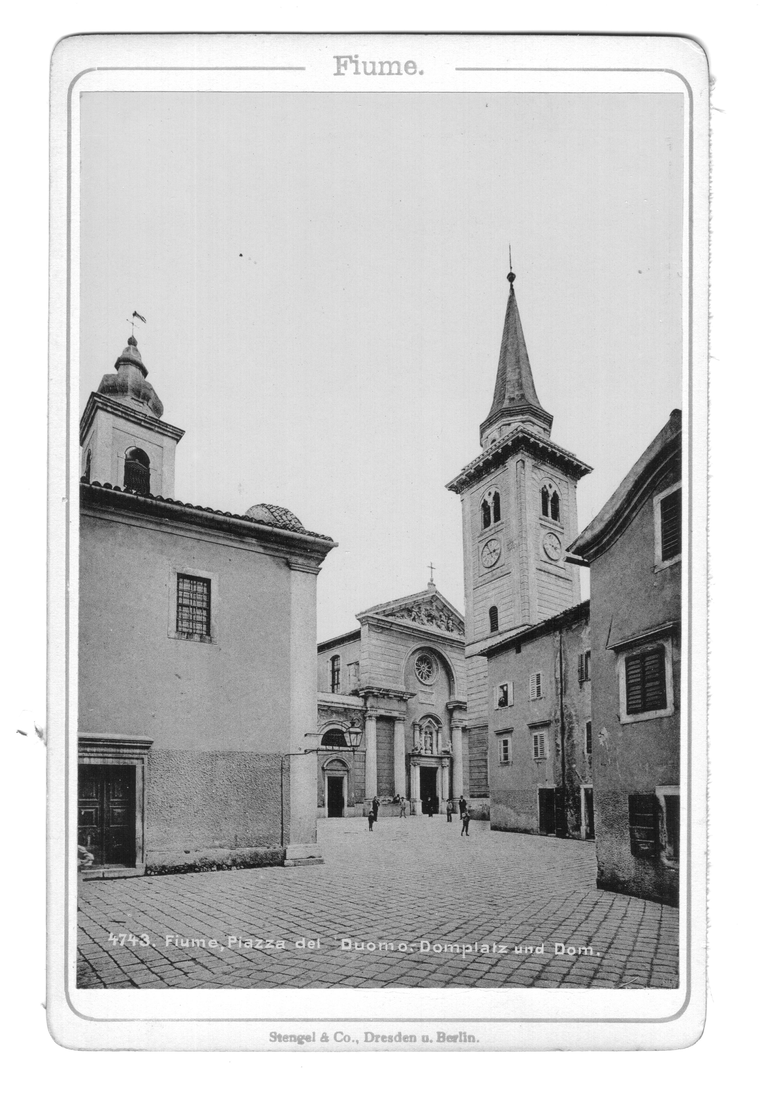 Magyar Királyság, Fiume. Edoardo Schambik fényképe. A FIUME című fényképalbum 12, fehér vászonnal összefűzött fényképe közül az utolsó fénykép hátoldalára ragasztott kék-fehér bélyeg szövege a következő: EDOARDO SCHAMBIK FIUME Corso No 13. ©© Megjelent Creative Commons alatt a Metapolisz sorozatban. A Metapolisz sorozat valamennyi képe és filmje Creative Commons alatti valamint kereskedelmi - for profit - célra is felhasználható. Ajánlott hivatkozás: Derzsi Elekes Andor: Metapolisz DVD line ©© Published under Creative Commons in the Metapolisz DVD line. All of the photos and vids in the Metapolisz DVD line are under Creative Commons and can be used even for commercial – for profit – purposes. Recommended Citation Derzsi Elekes Andor: Metapolisz DVD line